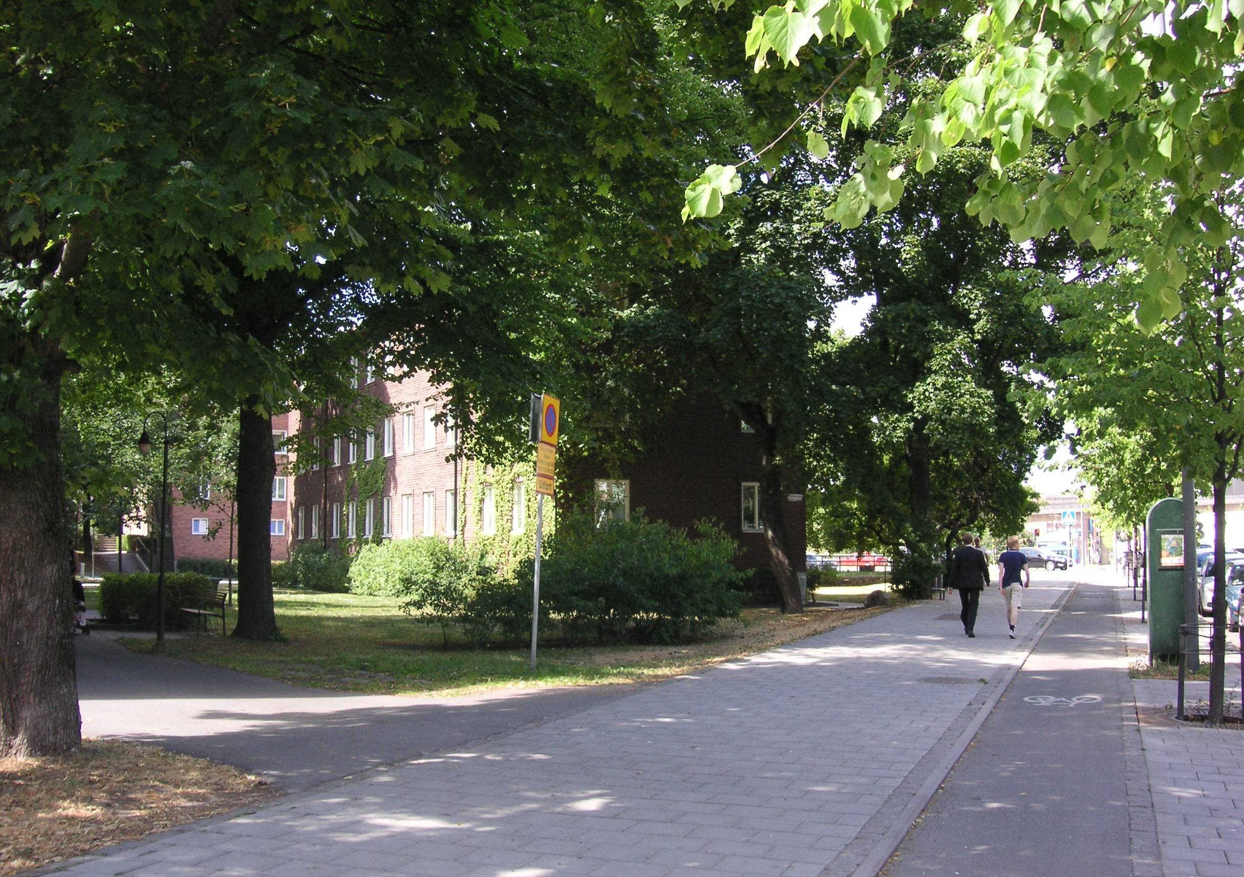 Lindhagensgatan västerut vid Stiernhjelmsvägen